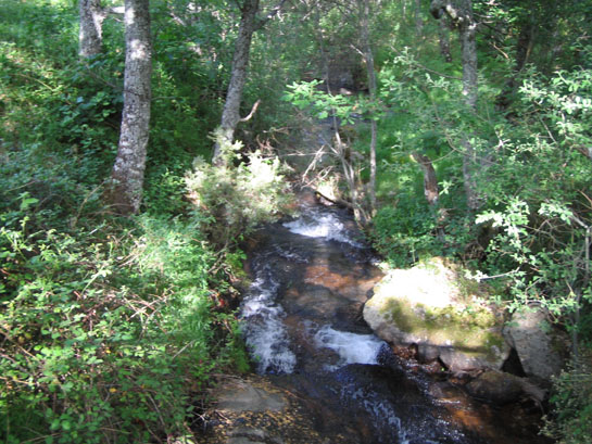 La Acebeda (Madrid)